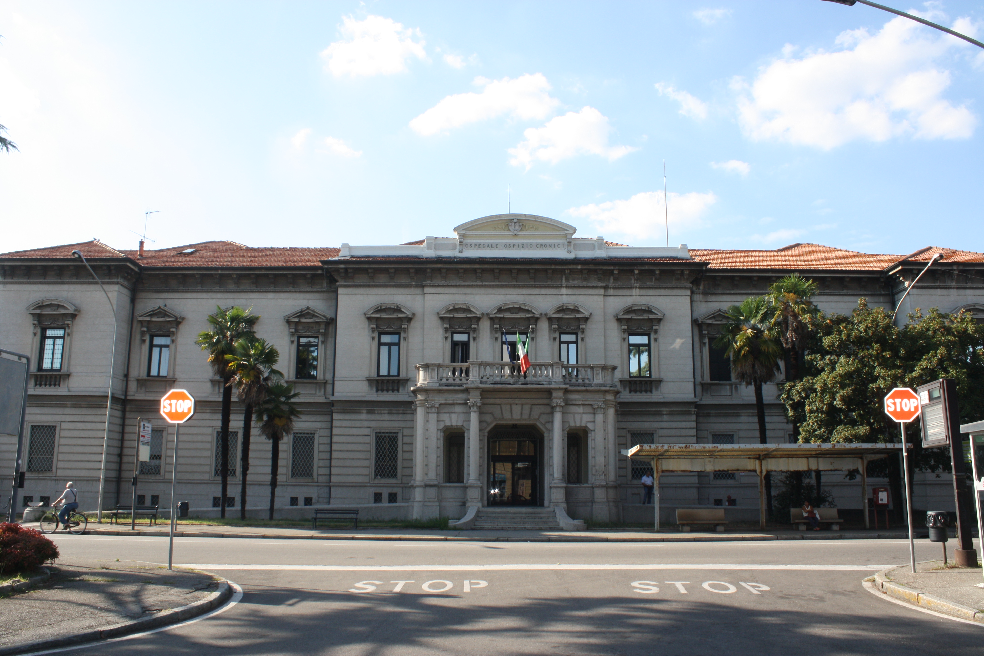 Ingresso storico dell’Ospedale di Busto Arsizio This is a photo of a monument which is part of cultural heritage of Italy.